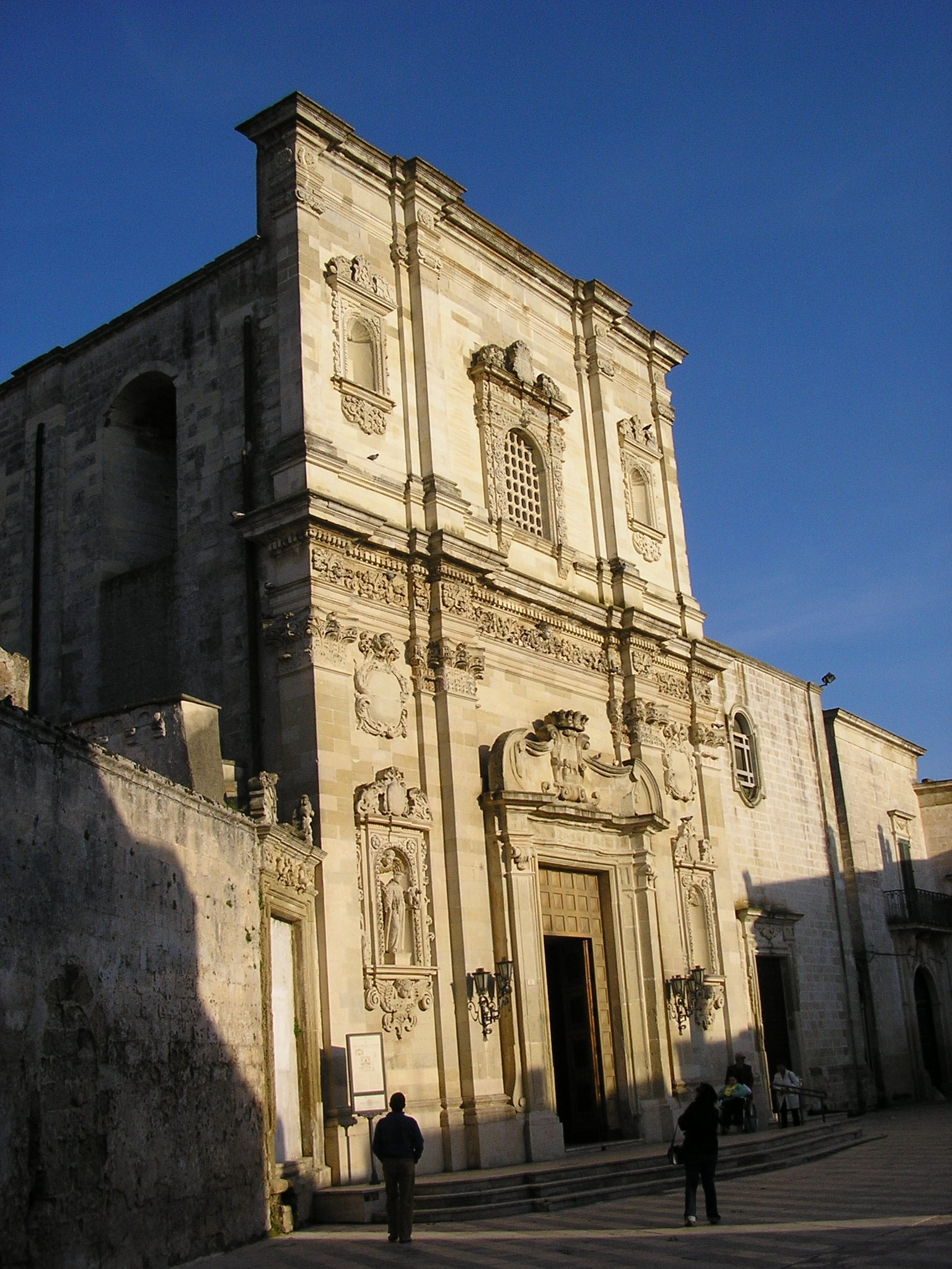 L'Eglise de la Trasfigurazione.